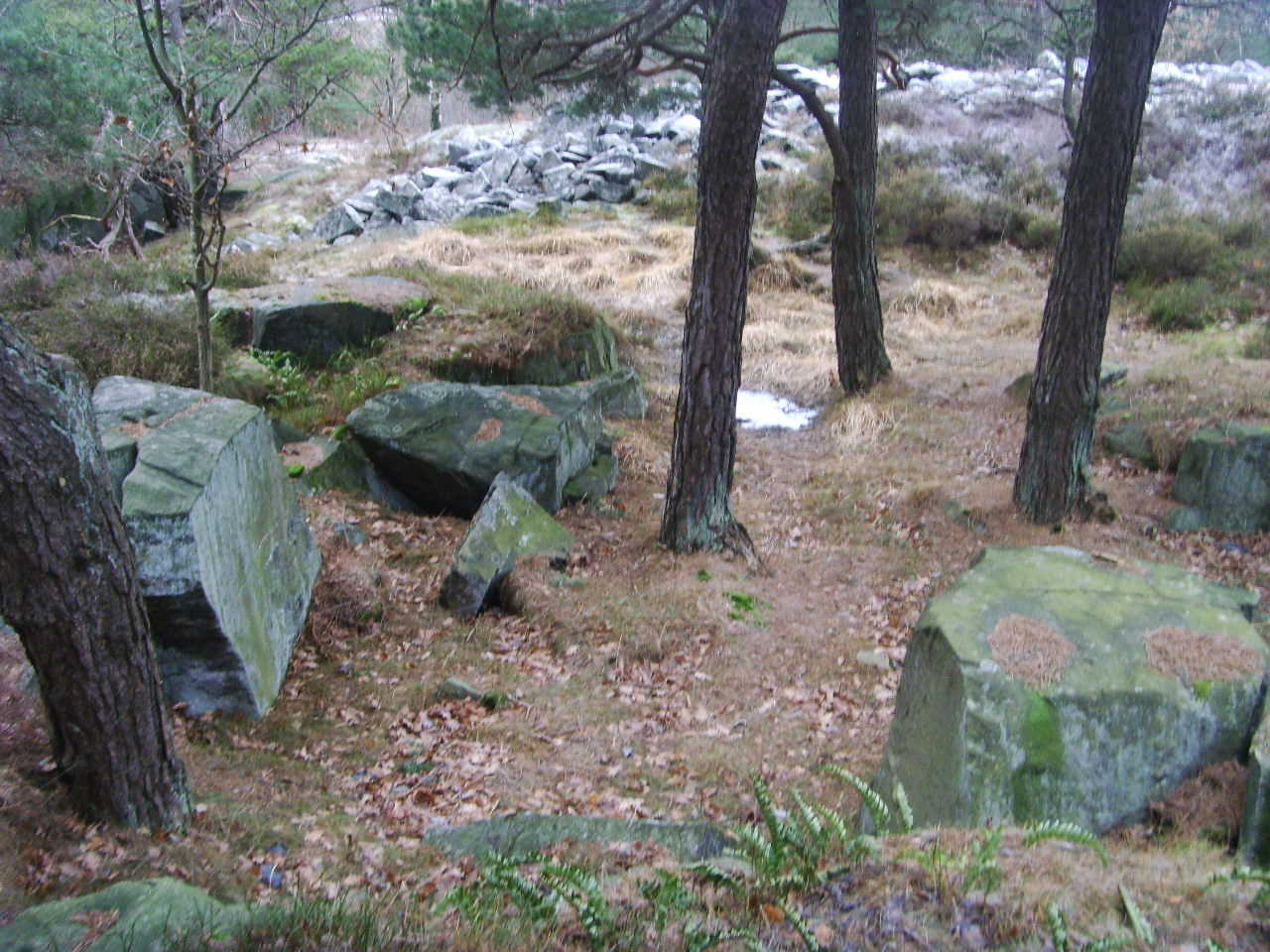 Fornborgen i Ruddalen i Göteborgs kommun, med beteckningen "RAÄ Västra Frölunda 119:1". På bilden ses delar av stenbrottet, där stenen till fornborgens stenvall hämtades.